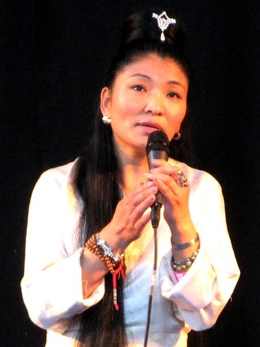 Yungchen Lhamo, 央金拉姆